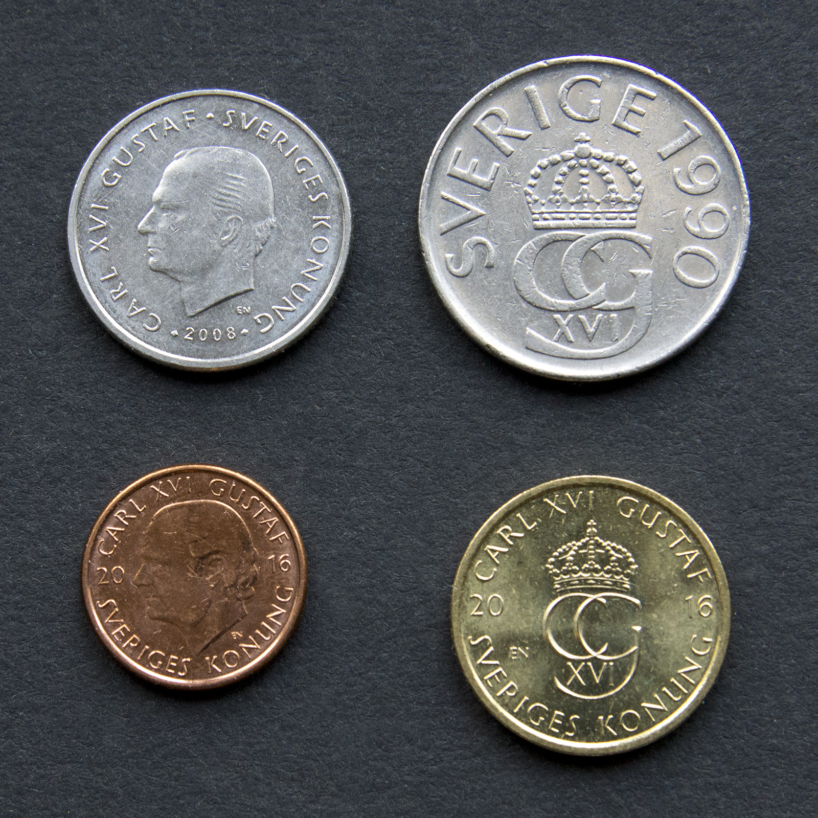 Storleksjämförelse mellan 1- och 5-kronorsmynt före och efter 2016.